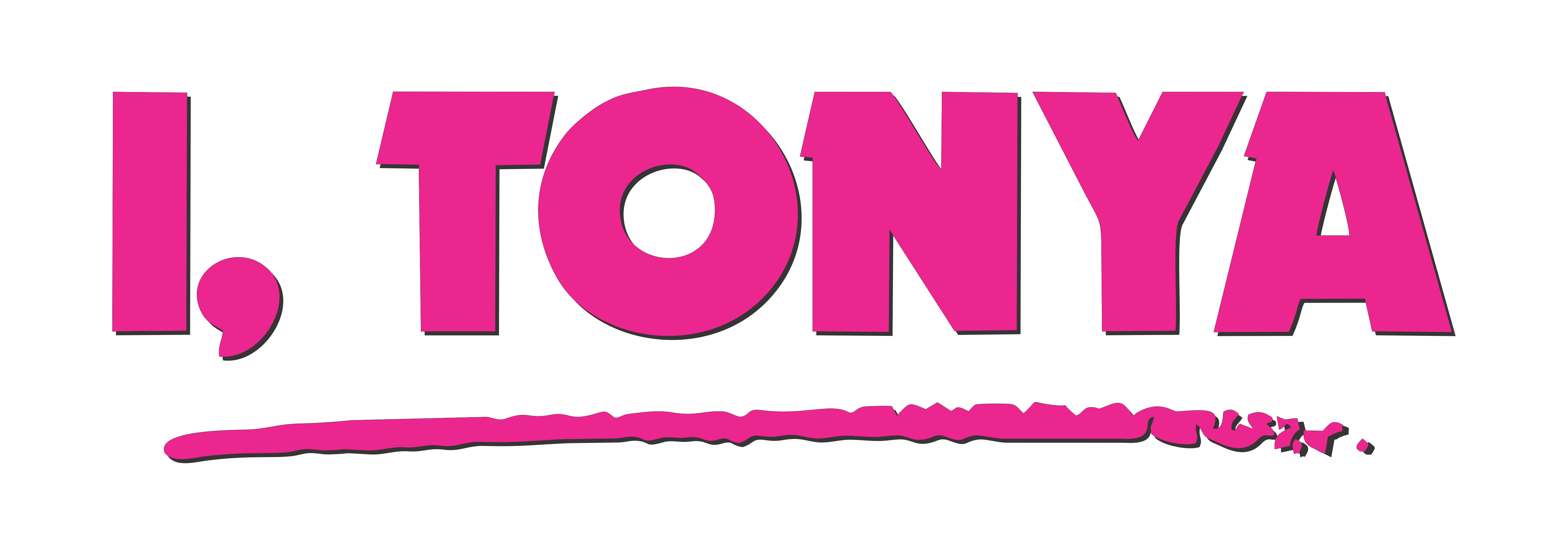 Logotipo de la cinta "I, Tonya" de 2017.